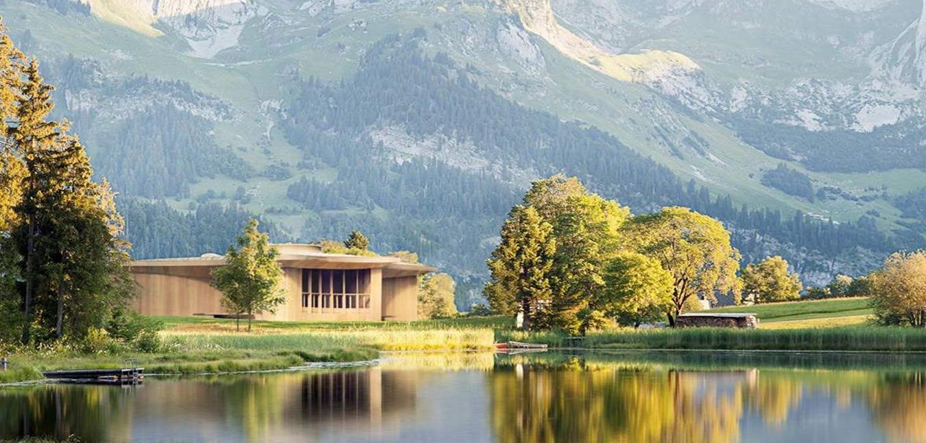 Standort des Klanghauses beim Schwendisee (Fotomontage)